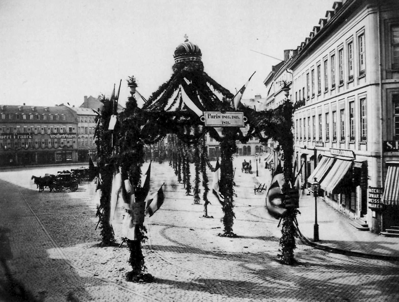 Der Rossmarkt in Frankfurt, nach dem Deutsch-Französischen Krieg